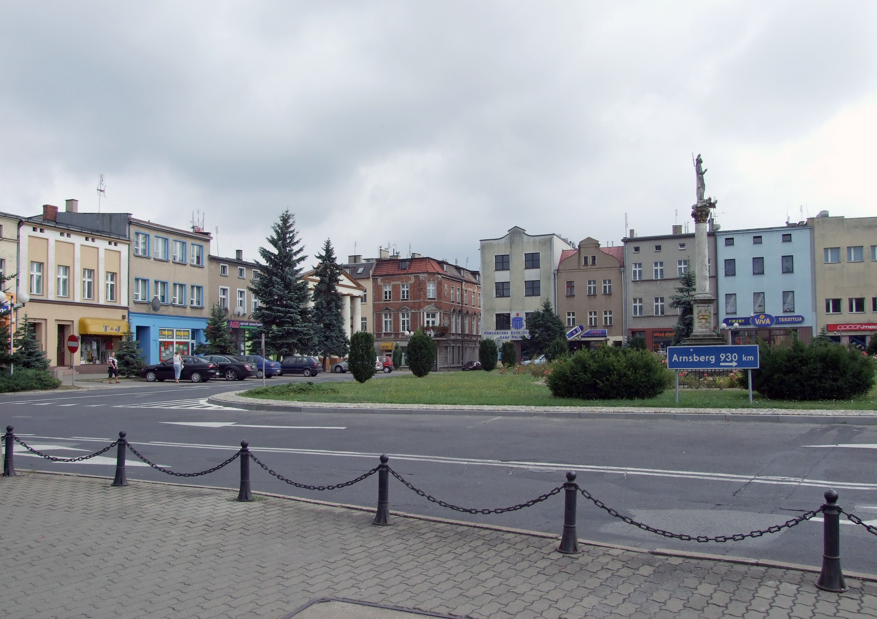 Rynek w Oleśnie